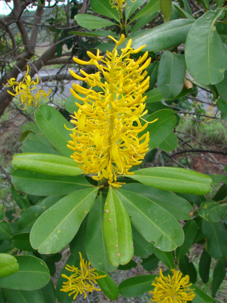 Vochysia tucanorum - VOCHYSIACEAE Alto Paraíso de Goiás - Goiás - Brasil.